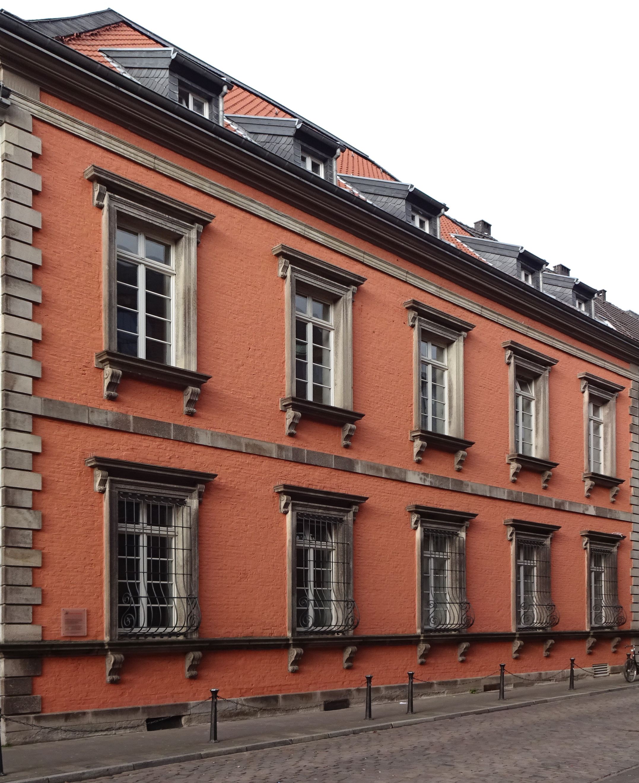 Fassade Palais Schaesberg, Ritterstraße 16, Düsseldorf-Altstadt